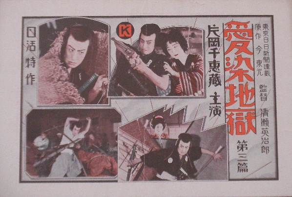 『愛染地獄 第三篇』、1930年、フライヤー